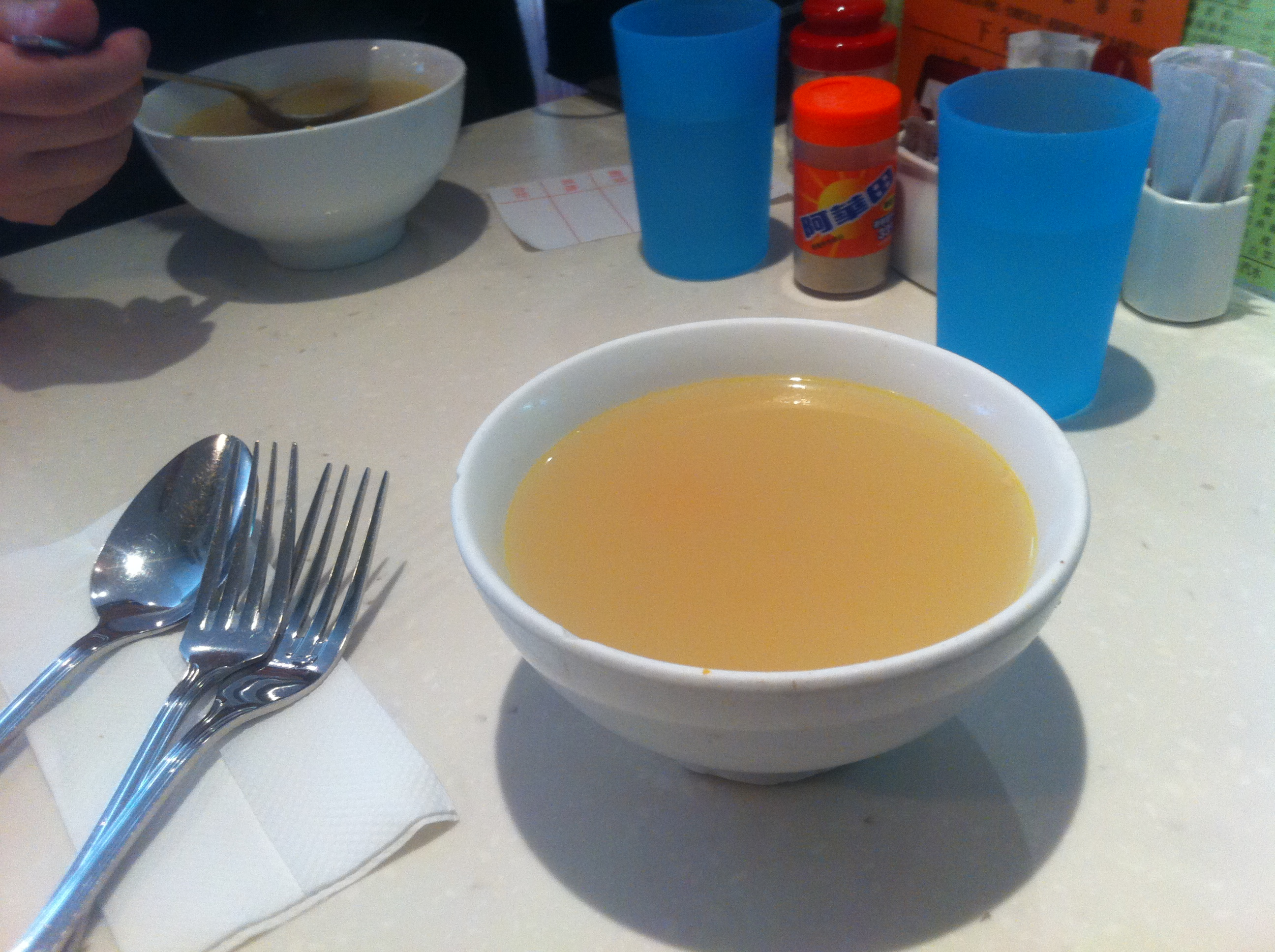 中文（香港）: 香港島西環 鴻興茶餐廳zh:例湯